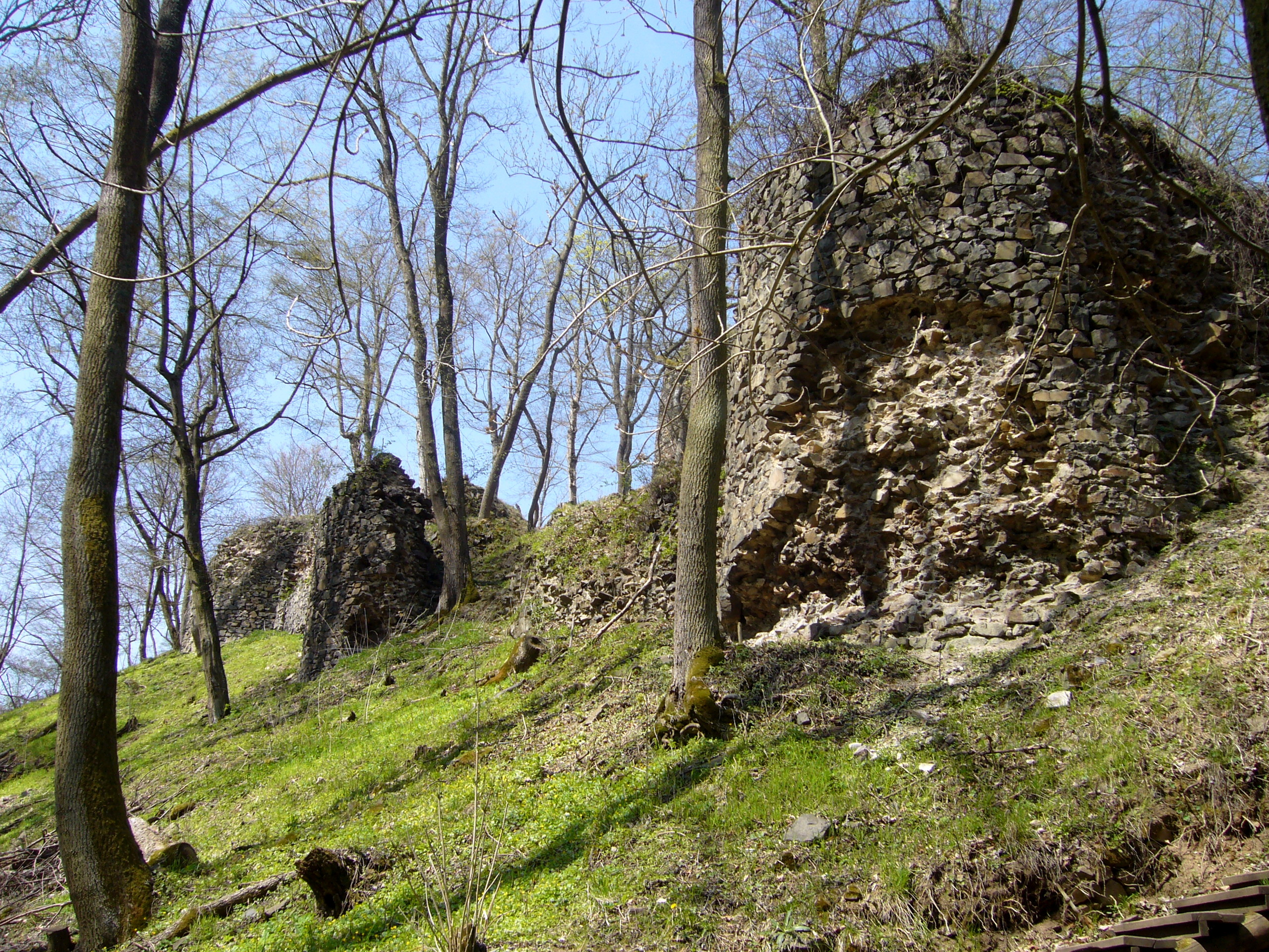 Jižní strana dolního hradu s flankovacími věžemi, Hrad Týřov, Karlova Ves (okres Rakovník).